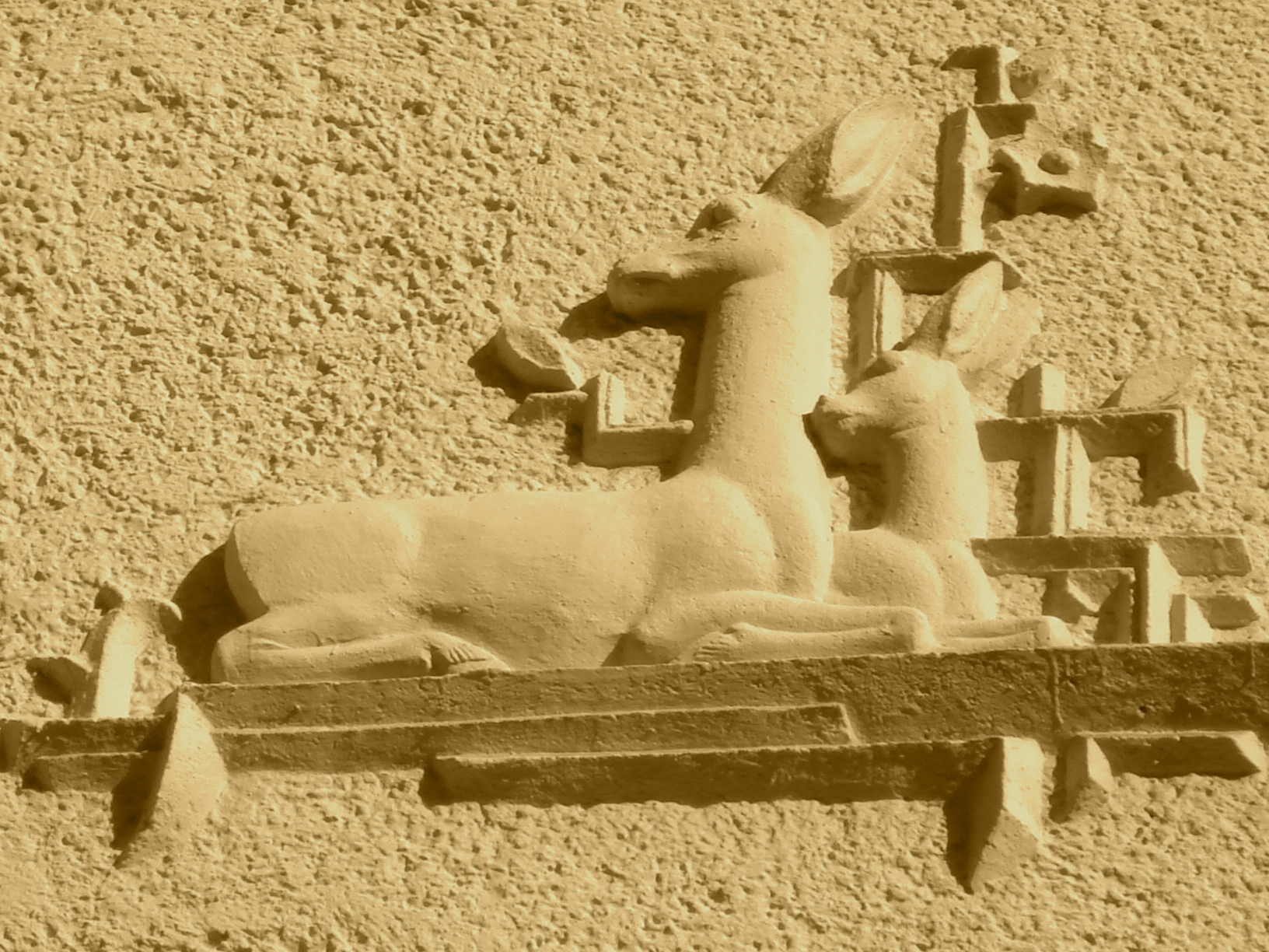 Detail in den Ceciliengärten